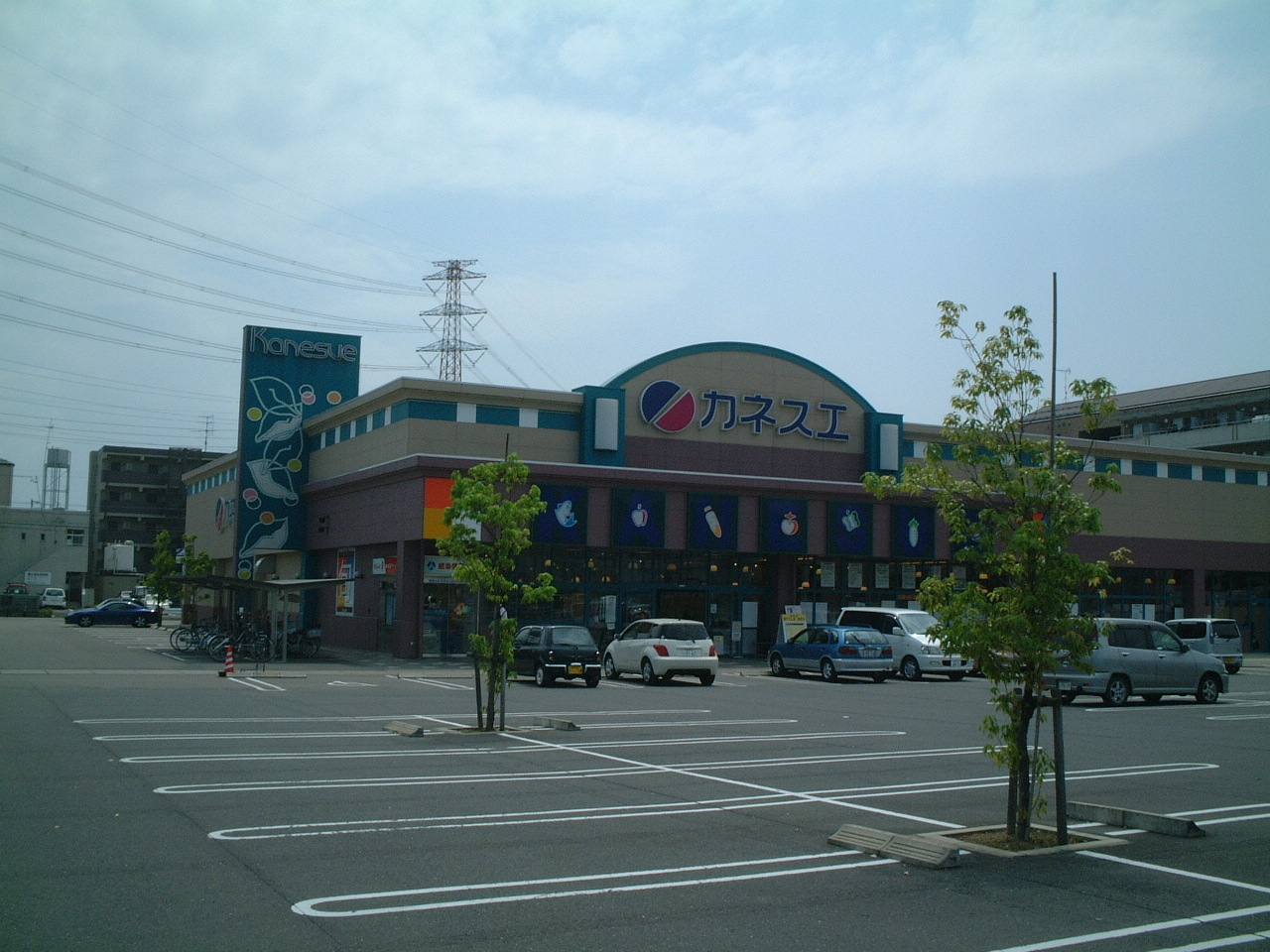 カネスエ岐大前店の画像